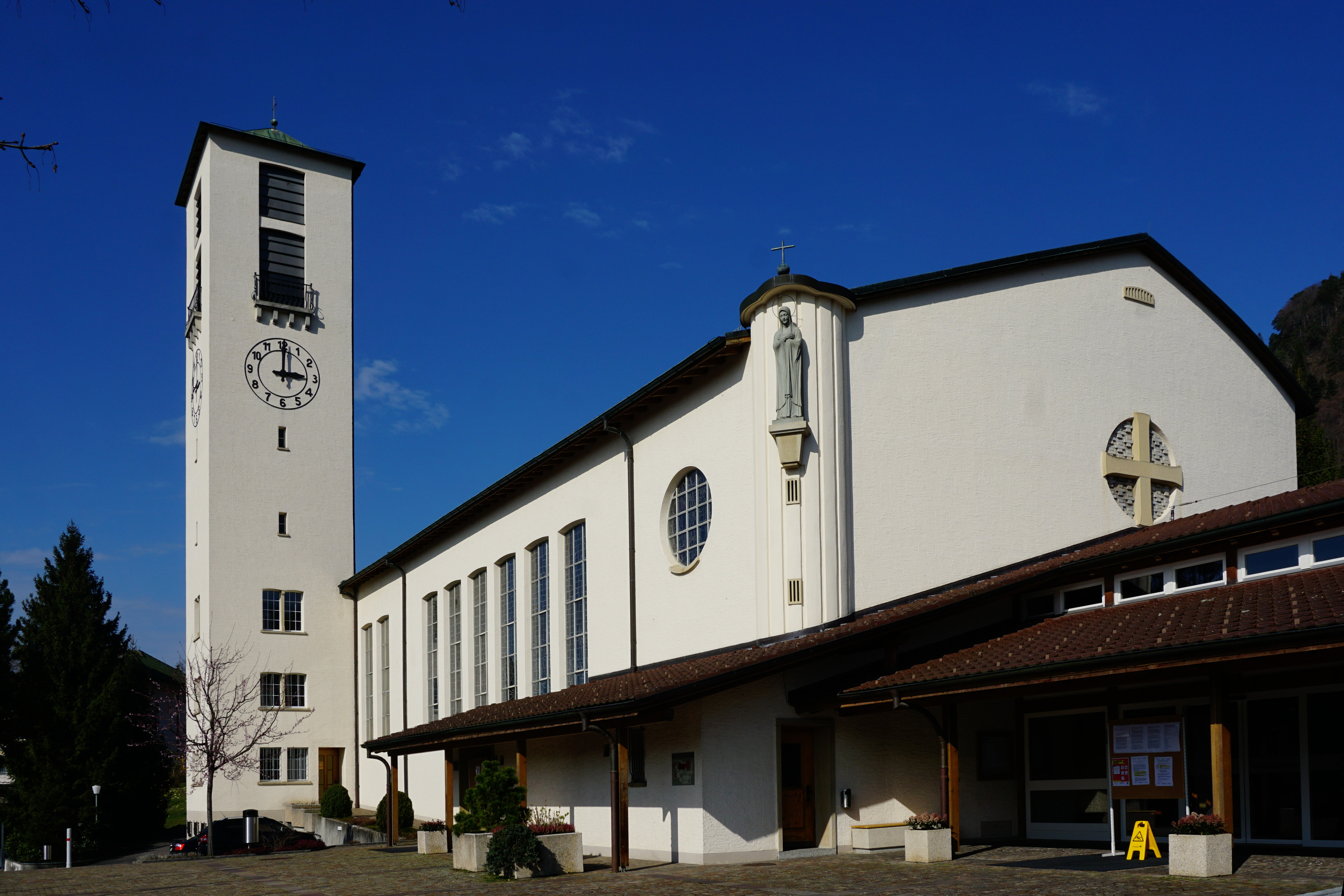 Römisch Katholische Pfarrkirche St. Marien